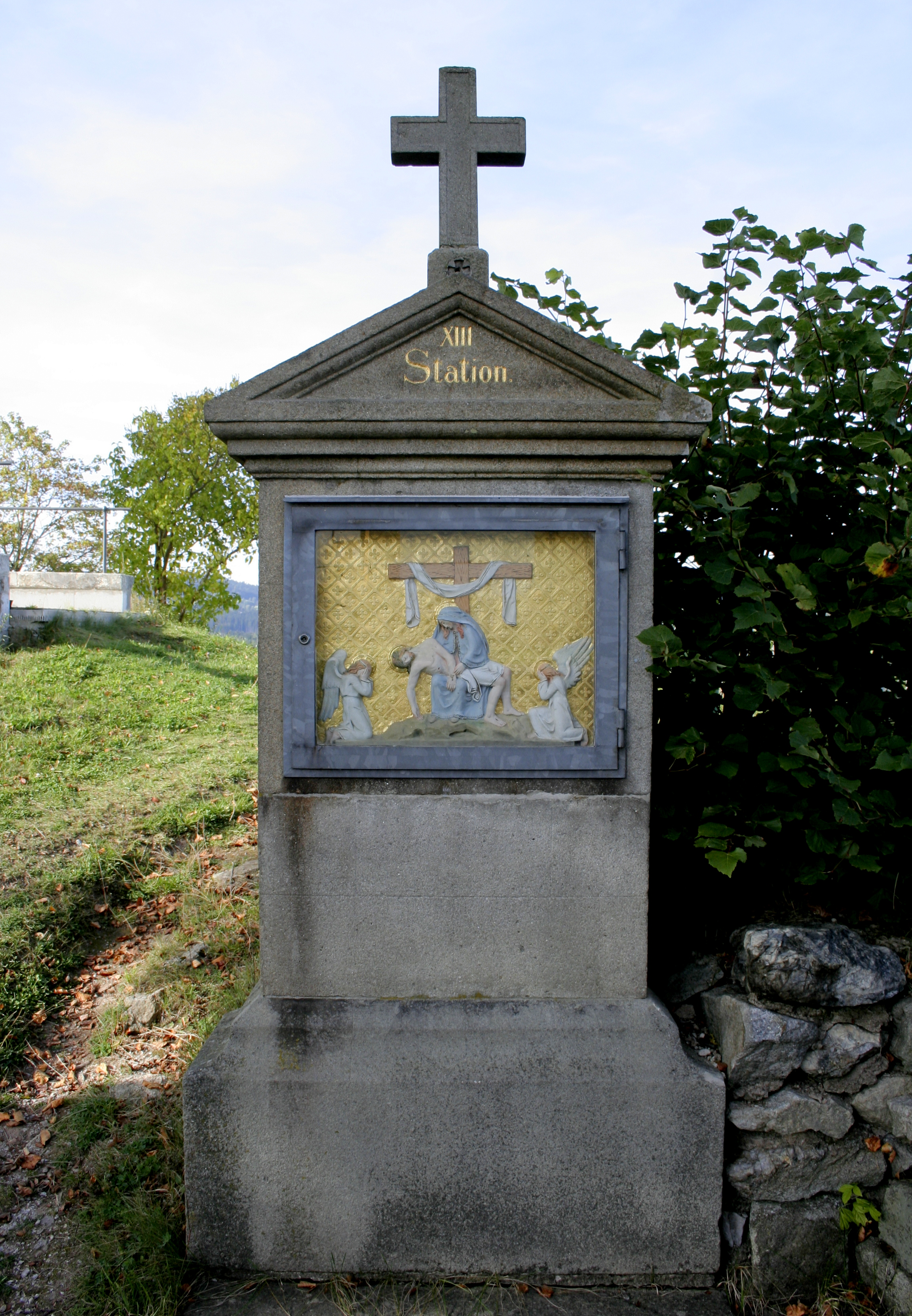 Baudenkmal Deutschland; Bayern; Oberpfalz; Neustadt a.d.Waldnaab; Pleystein; Kreuzbergweg; Kreuzweg mit 14 Stationen, Ädikulaform auf Stufenpostament, mit Kreuzbekrönung und farbig gefassten Keramikreliefs, klassizistisch, um 1800; Station XIII (D-3-74-147-9)This is a photograph of an architectural monument.